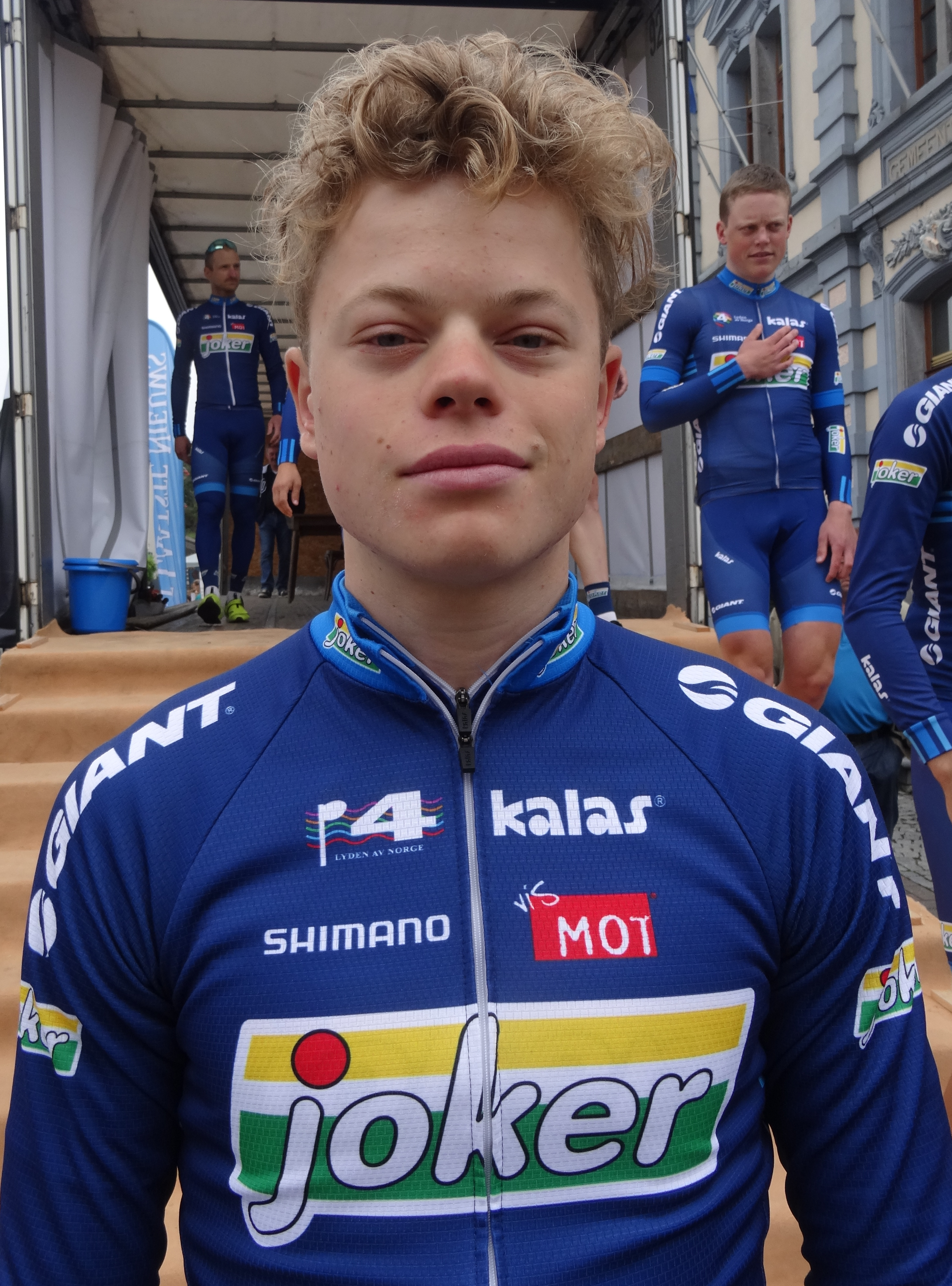 Reportage photographique réalisé le mercredi 27 août à l'occasion du départ de la Druivenkoers Overijse 2014 à Huldenberg, Belgique.